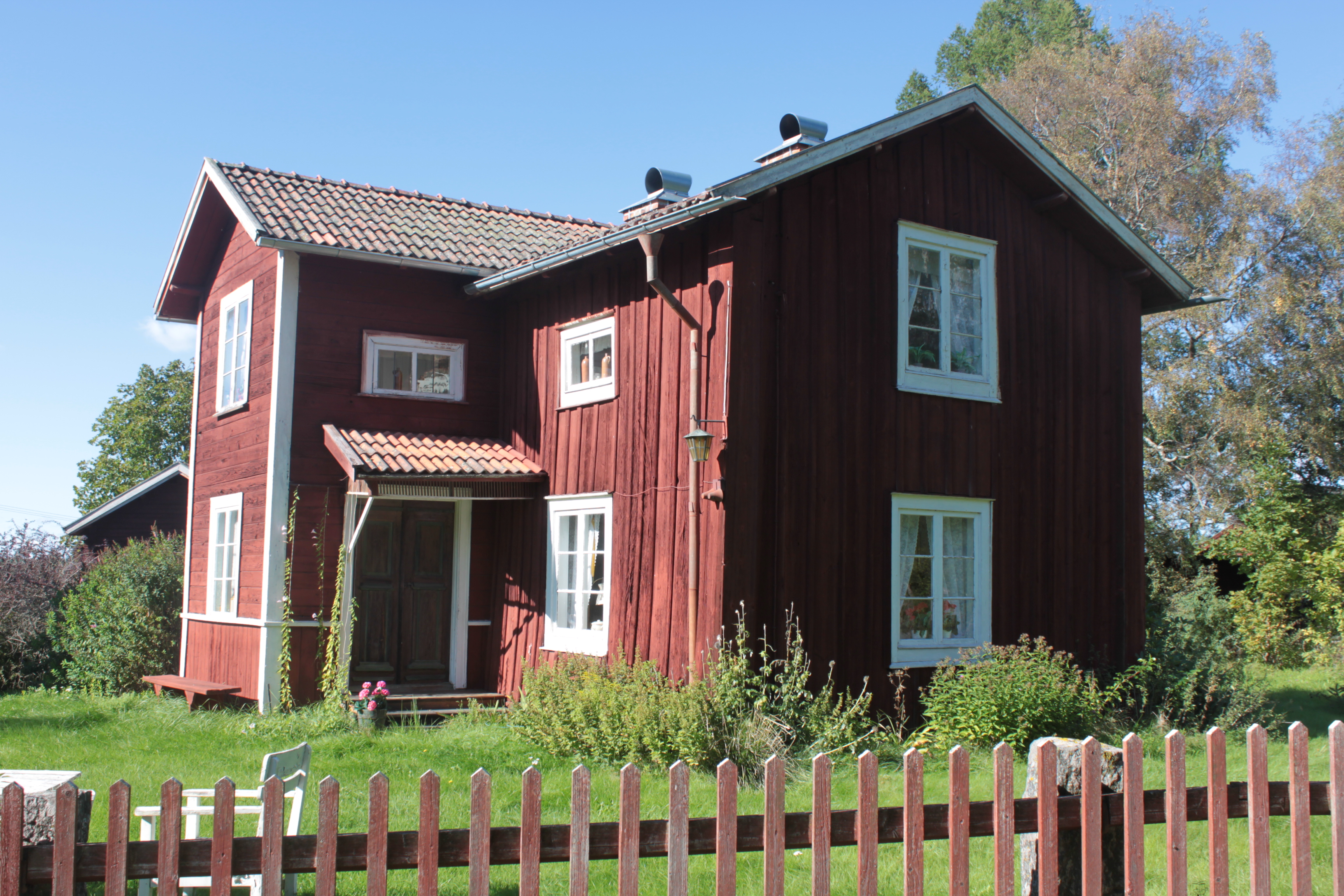 Framsidan av Styfstorpet.